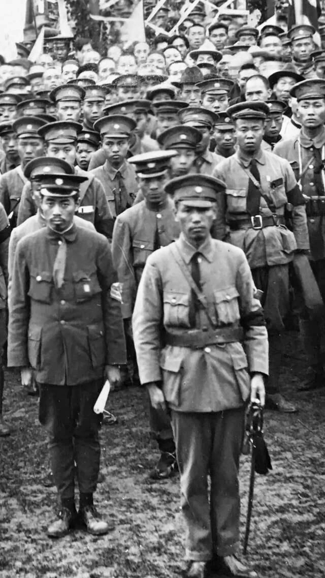 周恩来与蒋介石的合影